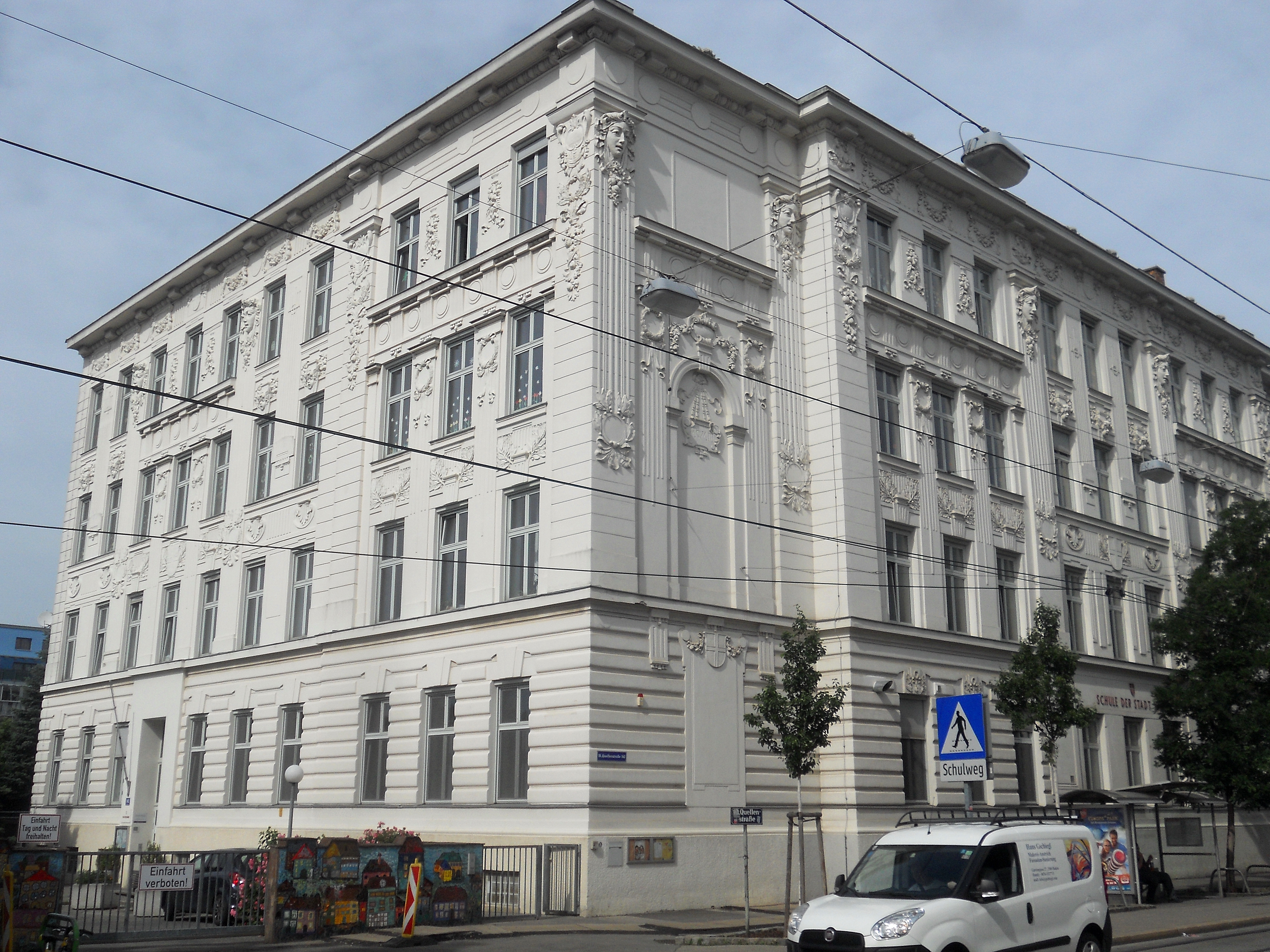 Schule